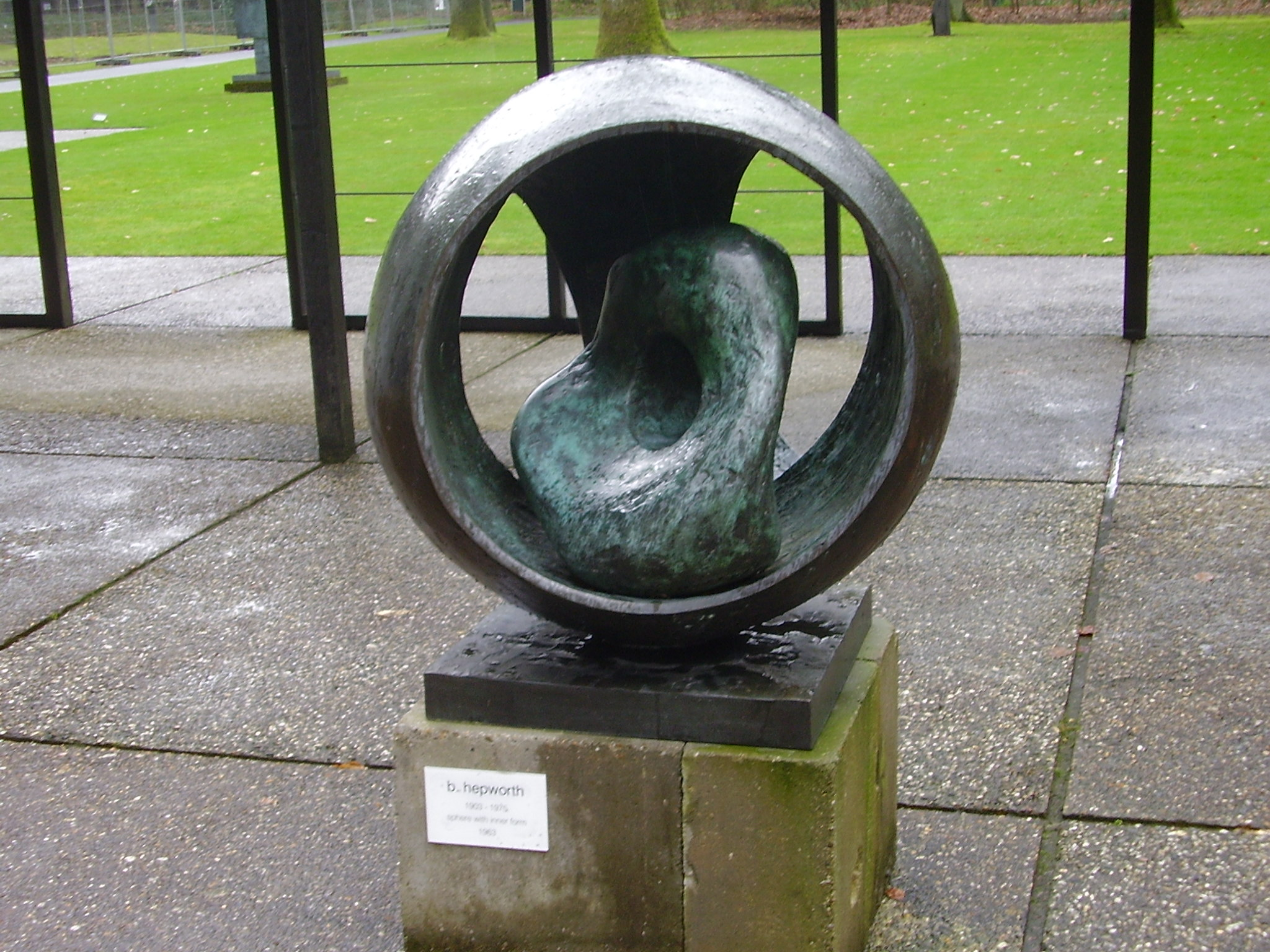 Obra de Hepworth, titulada: Sphere with Inner Form en el Kroller Muller Museum. Production by Art Bronze Foundry London Ltd.